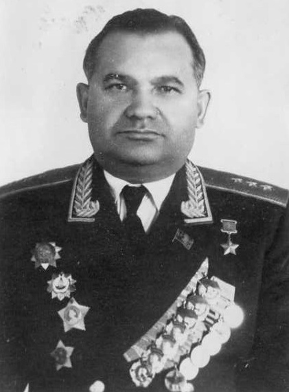 Яков Григорьевич Крейзер (1905 — 1969) — советский военачальник